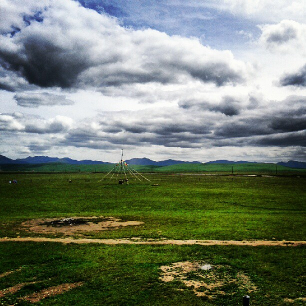 桑科草原